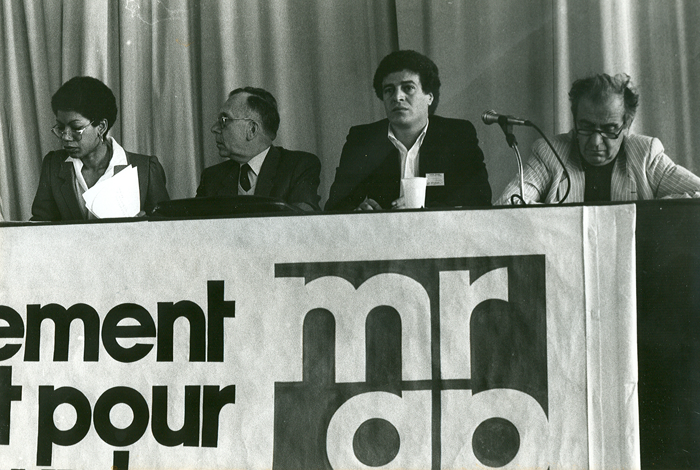 Colloque MRAP avec George Pau-Langevin et Mouloud Aounit